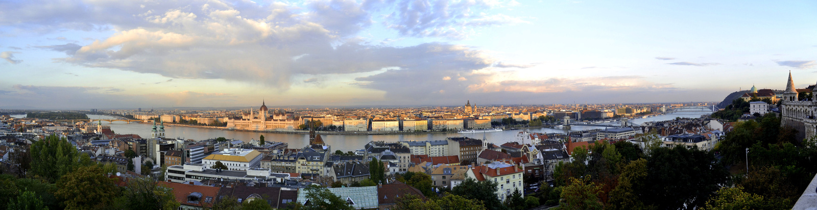 Országház (Budapest 5, Kossuth Lajos tér 1-3., Széchenyi István rakpart 11.) This is a photo of a monument in Hungary, Identifier: 509